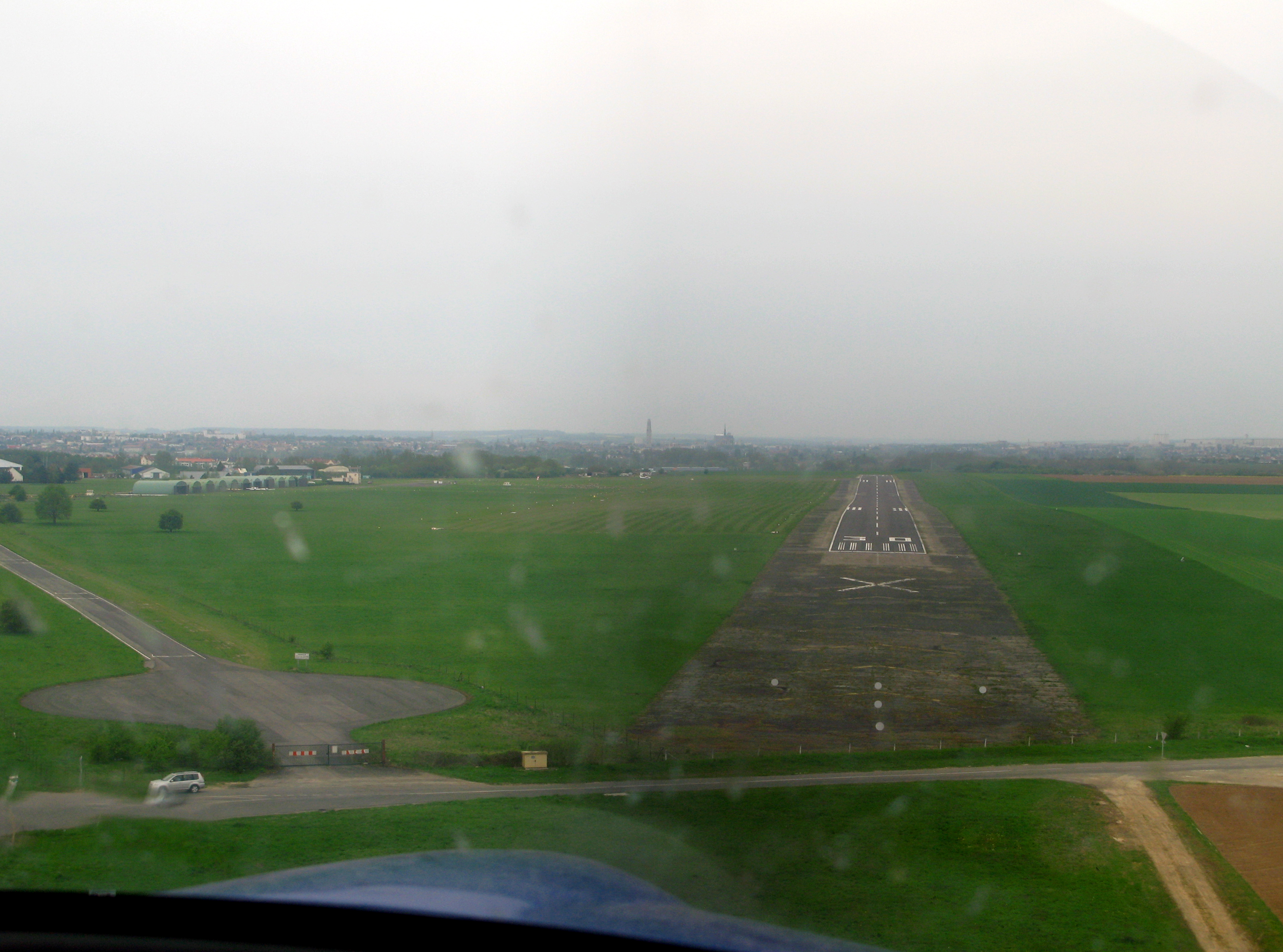 Glisy (Somme, France) - Alignement pour atterrissage sur l'aérodrome. On remarque : au loin, à l'horizon, les silhouettes de la Cathédrale d'Amiens et de la Tour Perret, le cockpit souillé par des impacts d'insectes, une zone assombrie (voir différence dans l'angle supérieur droit) due au mouvement de l'hélice. (La photo n'est pas parfaite ... les reflets du cockpit et sa relative opacité sont des problèmes qui ne peuvent pas toujours être parfaitement corrigés par un logiciel de traitement d'images.)